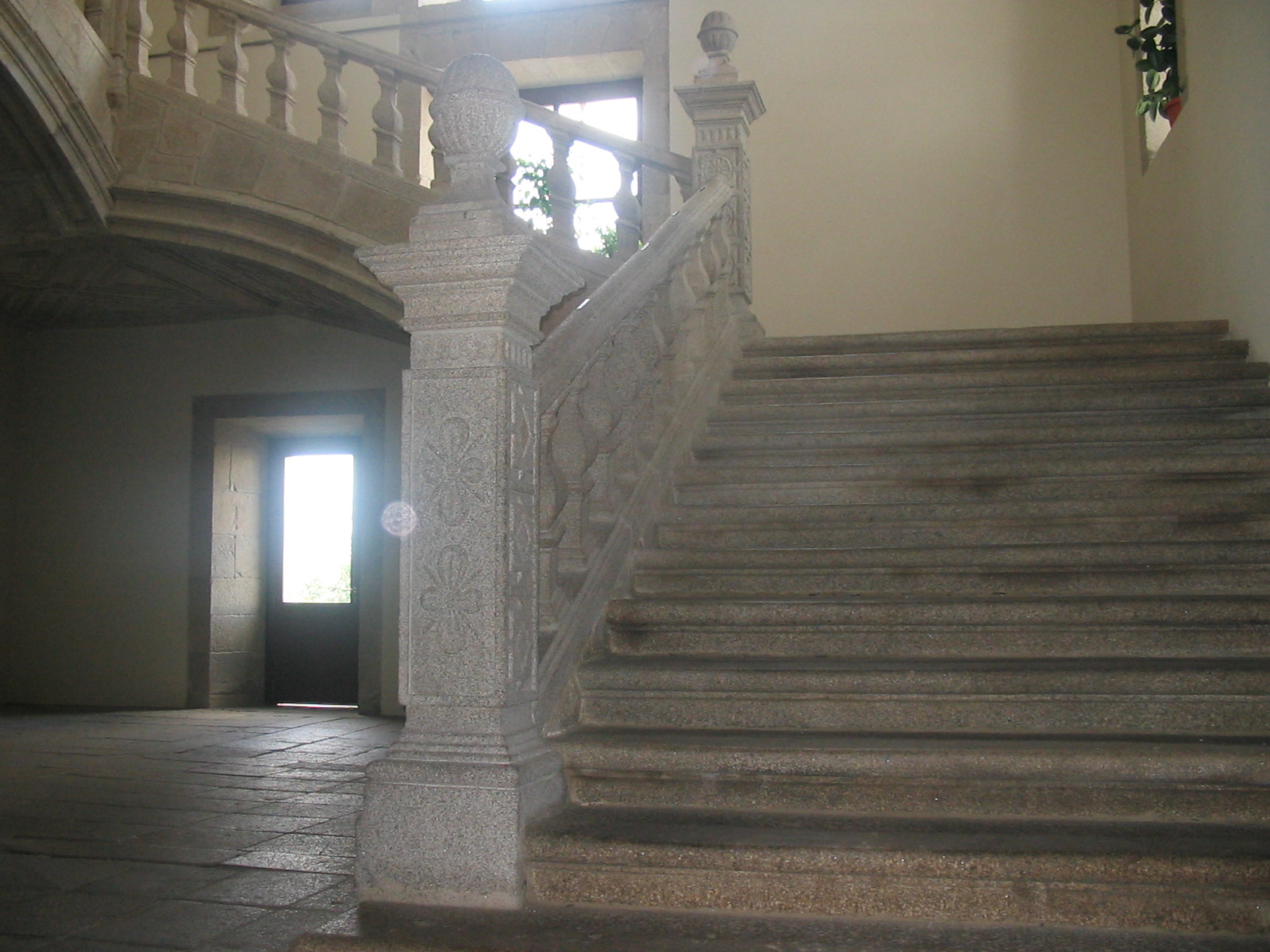 Escalera Monumental Nuestra señora de la antigua en Monforte de Lemos